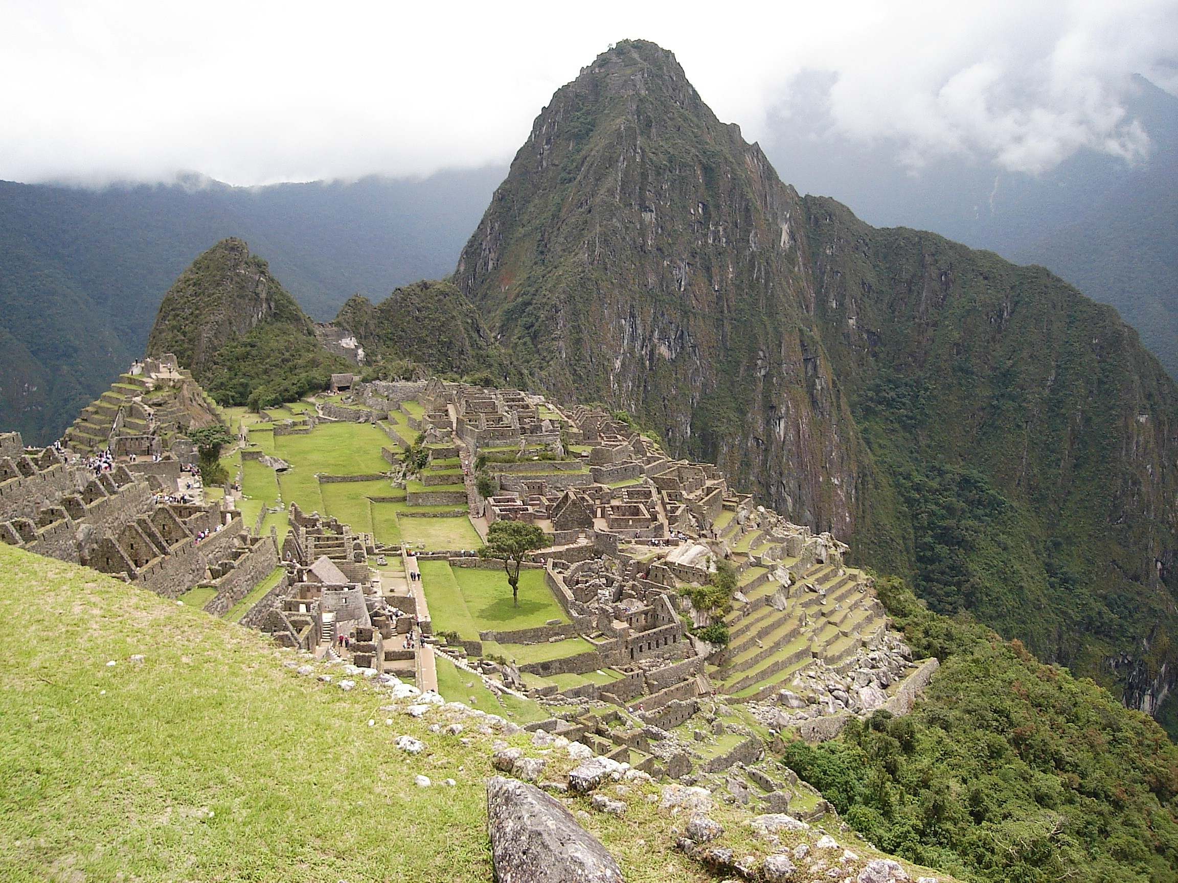 Foto tirada por mim, em Machu Picchu.